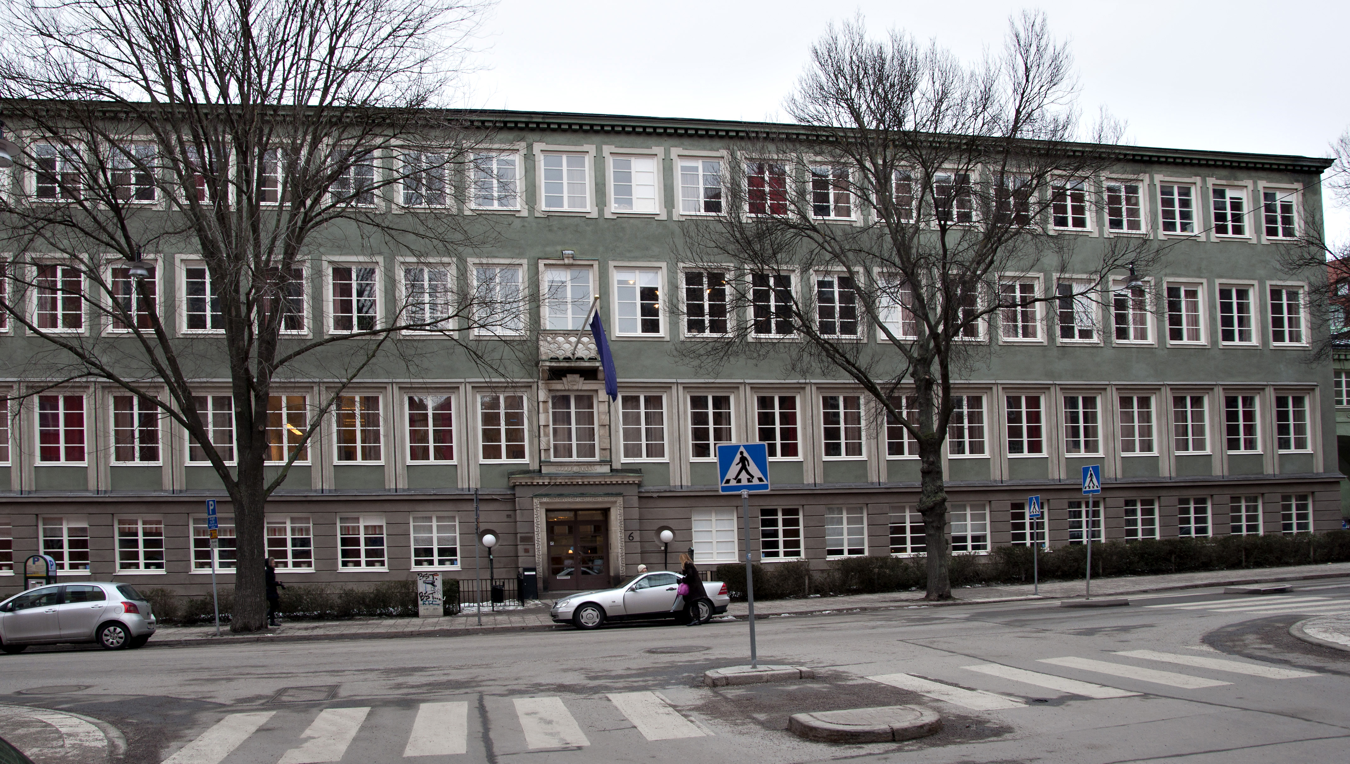 Borgarskolan, Kungstensgatan 2-8, Karlavägen 8-10, Birger Jarlsgatan 70-76. Byggnadsår 1930-32, arkitekt Knut Nordenskjöld, byggherre Stiftelsen Stockholms Borgarskola, byggmästare O Engkvist